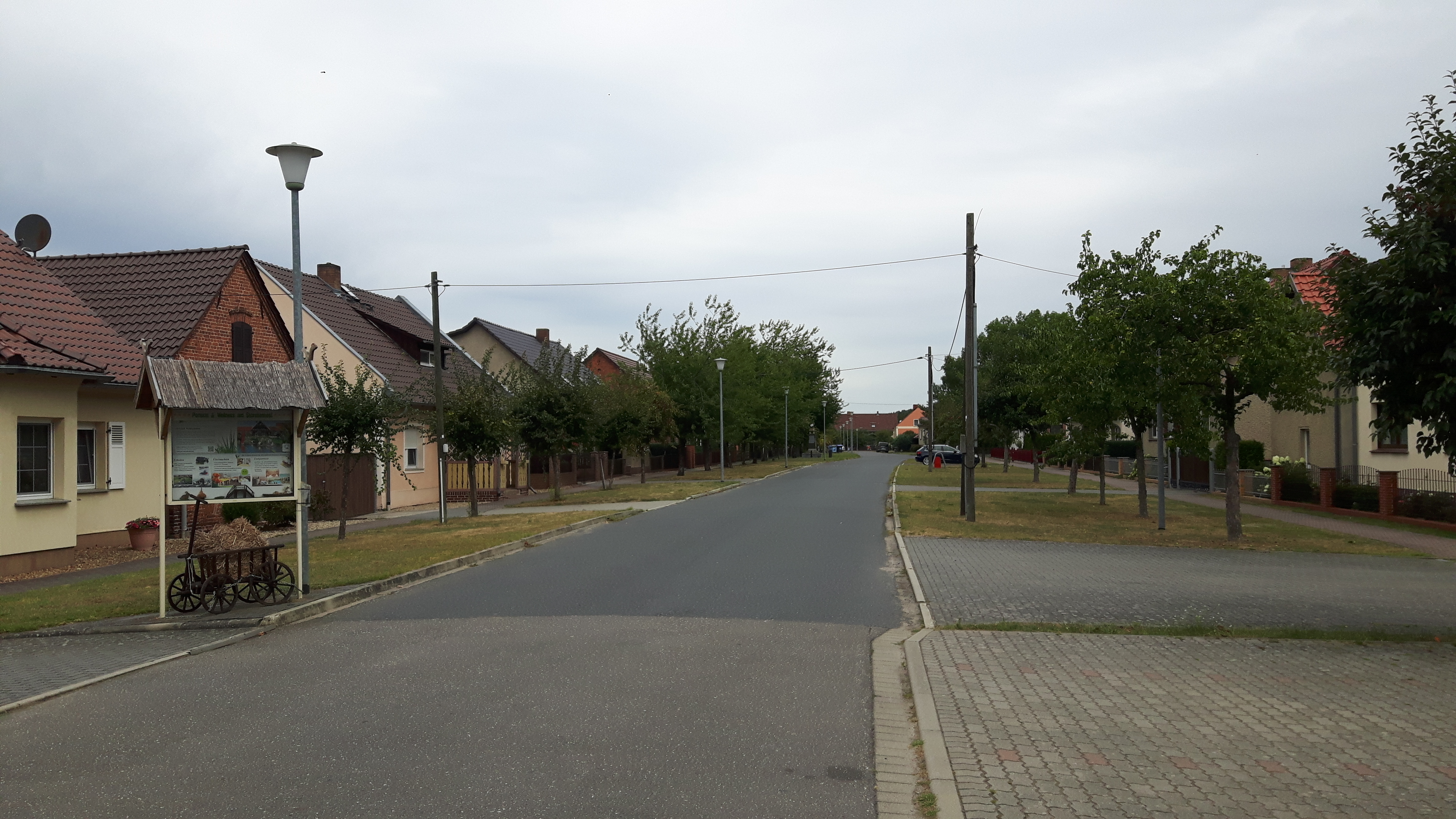 Die Dorfstraße in Biebersdorf in der Gemeinde Märkische Heide, Landkreis Dahme-Spreewald, Brandenburg.